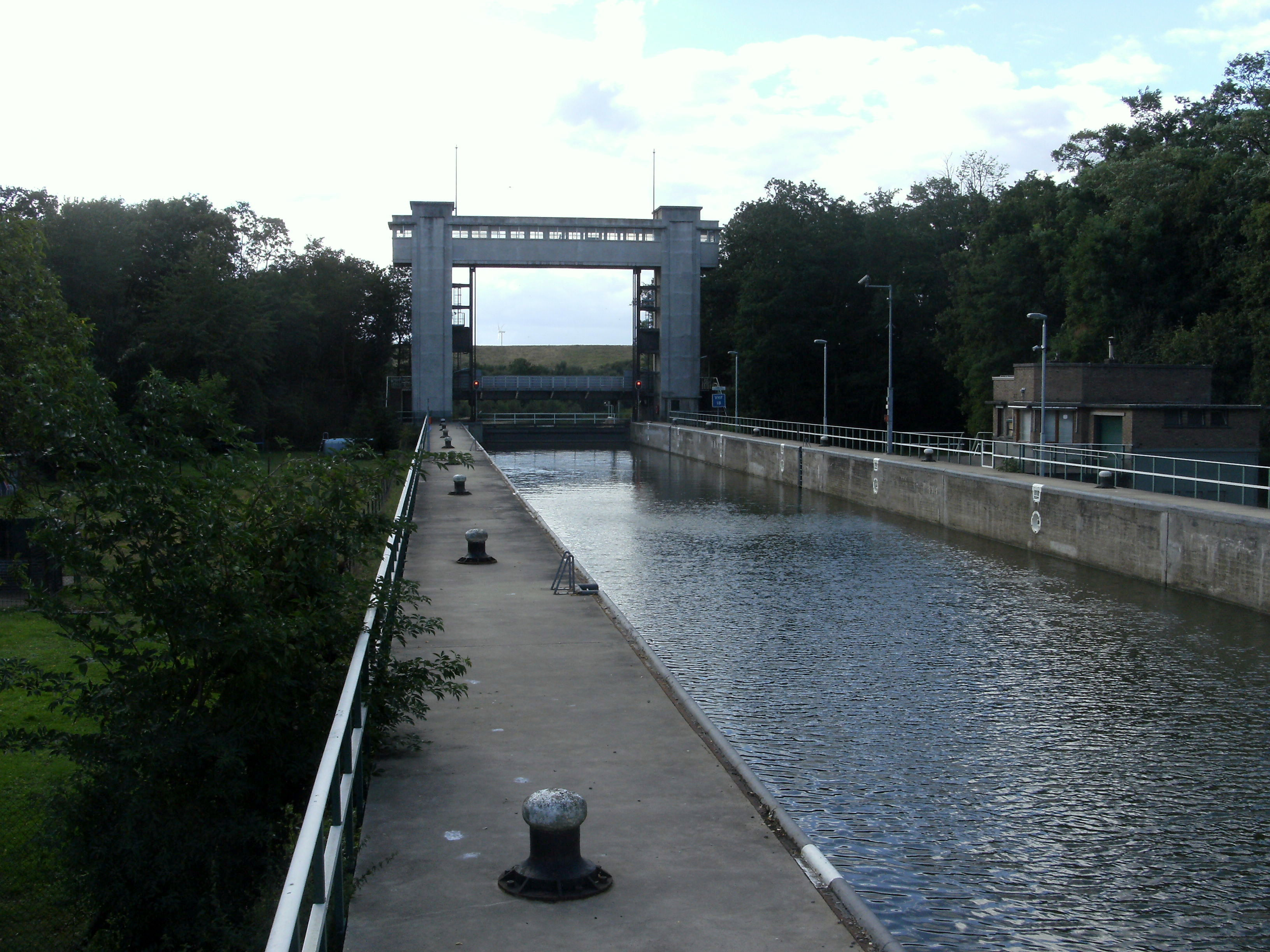 Maastricht 2012 Sluis Bosscherveld.